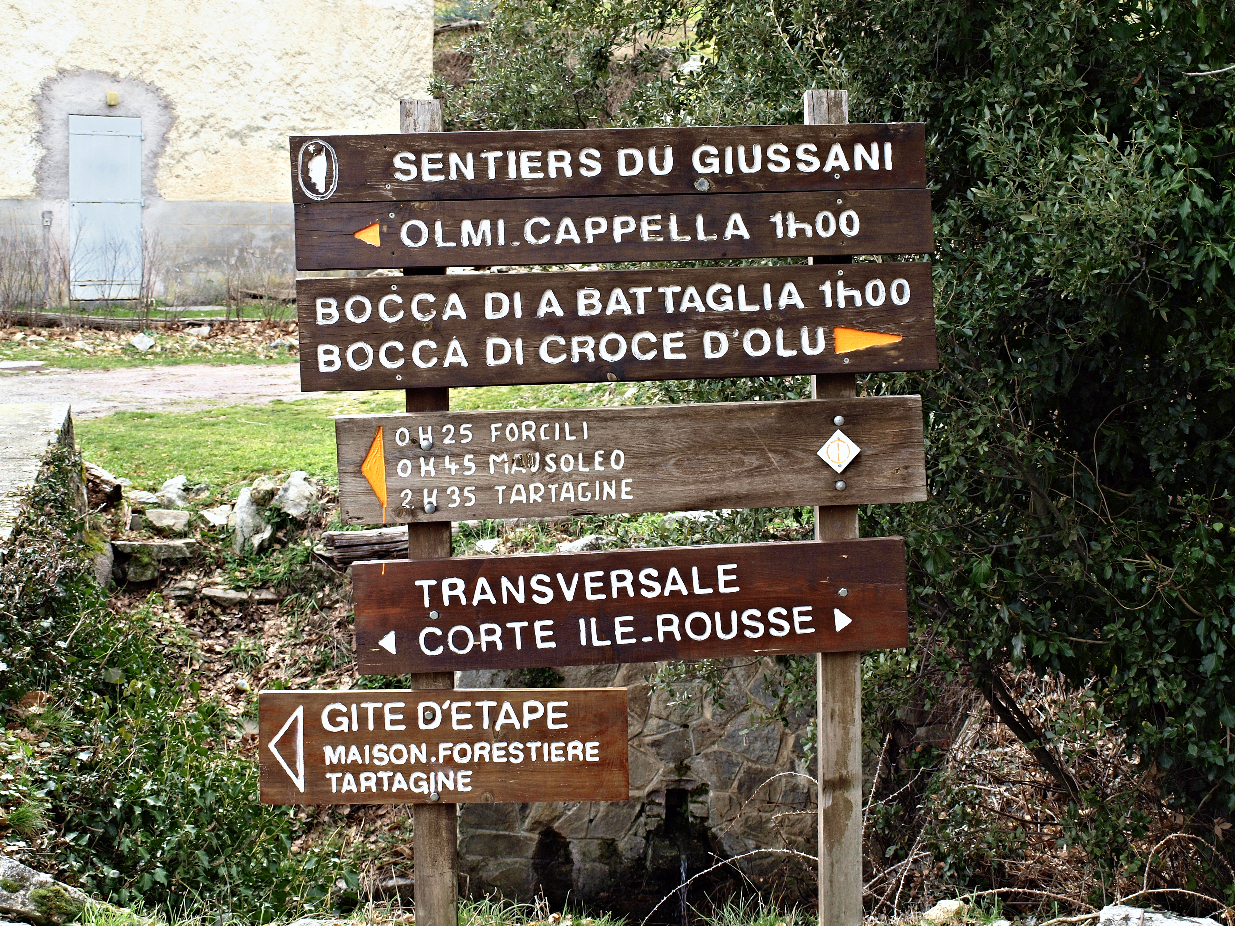 Pioggiola (Corsica) - Sentiers du Giunssani